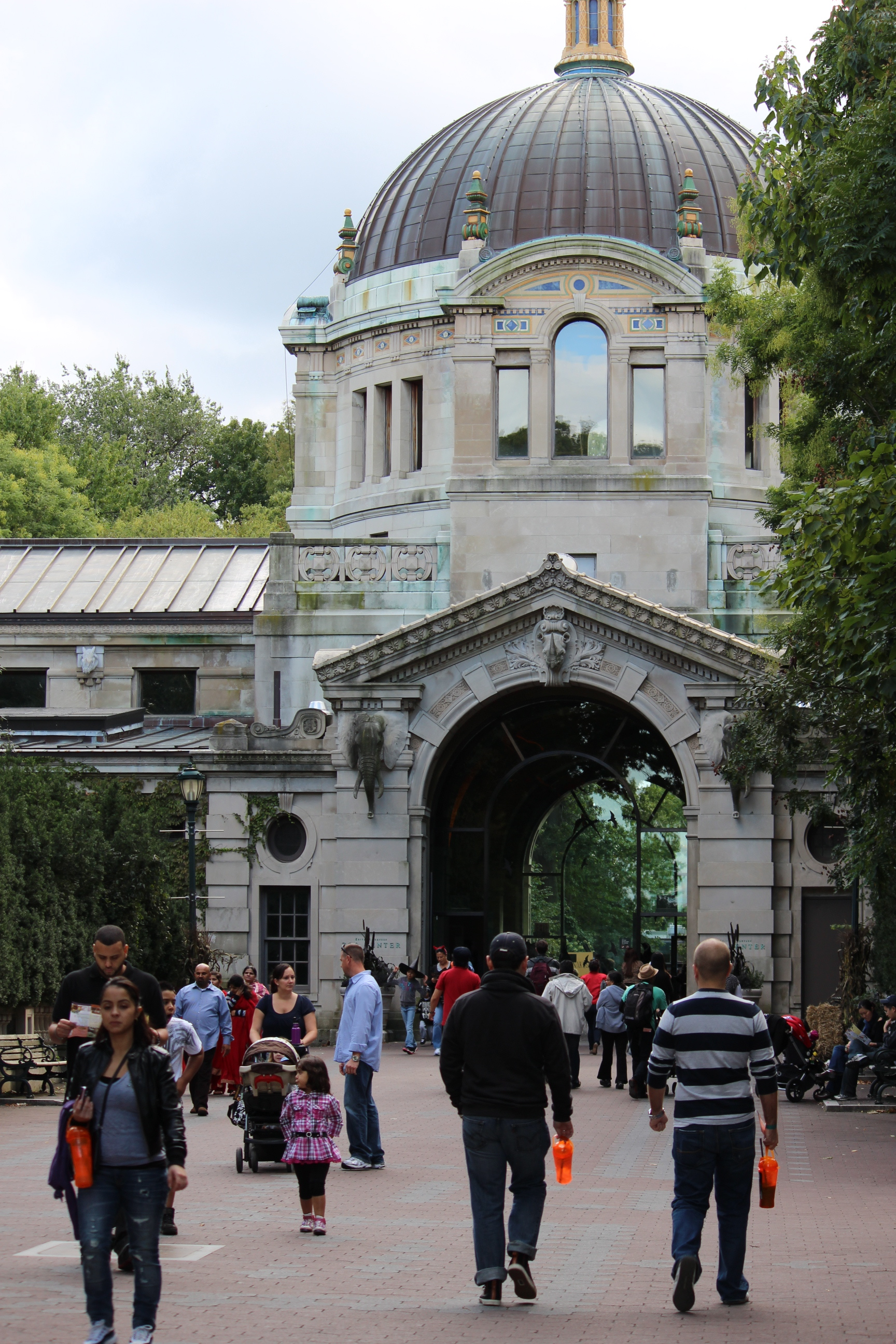 Bronx Zoo